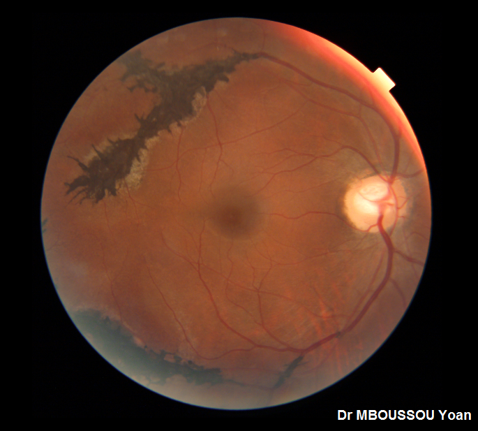 accumulation de pigments rétiniens disposés le long des veines